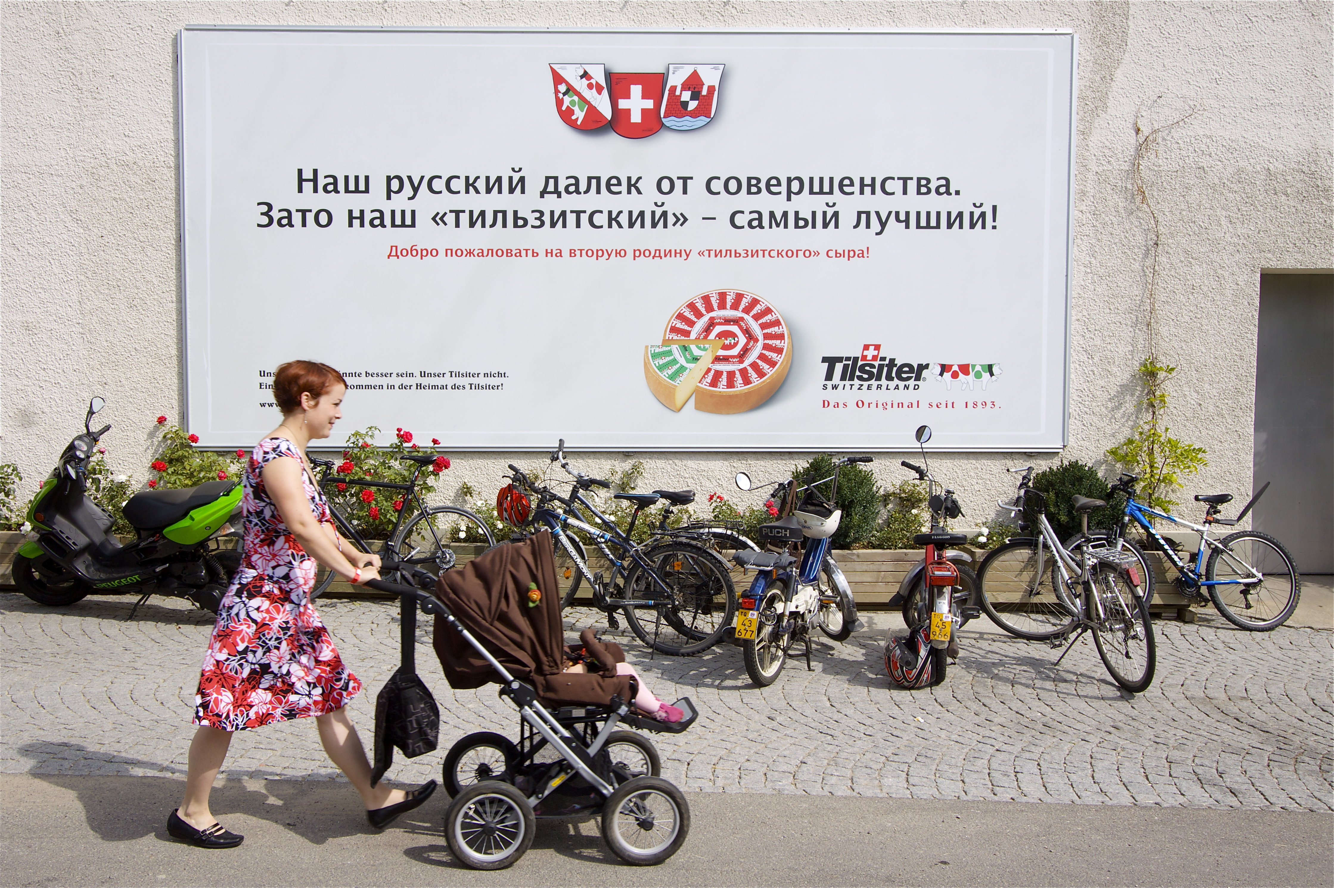 Sie dürfen das Foto mit Nennung des Autors und von honorarfrei vervielfältigen, verbreiten und öffentlich zugänglich machen. Разрешается бесплатное копирование и распространение материалов в некоммерческих и коммерческих целях, при этом ссылка на источник или указание имени автора обязательны. You are free to copy, distribute and transmit the foto free of charge with attribute by the author and Foto: Jürg Vollmer / фото: Юрг Фольмер / Hintergrund-Beitrag zum Foto